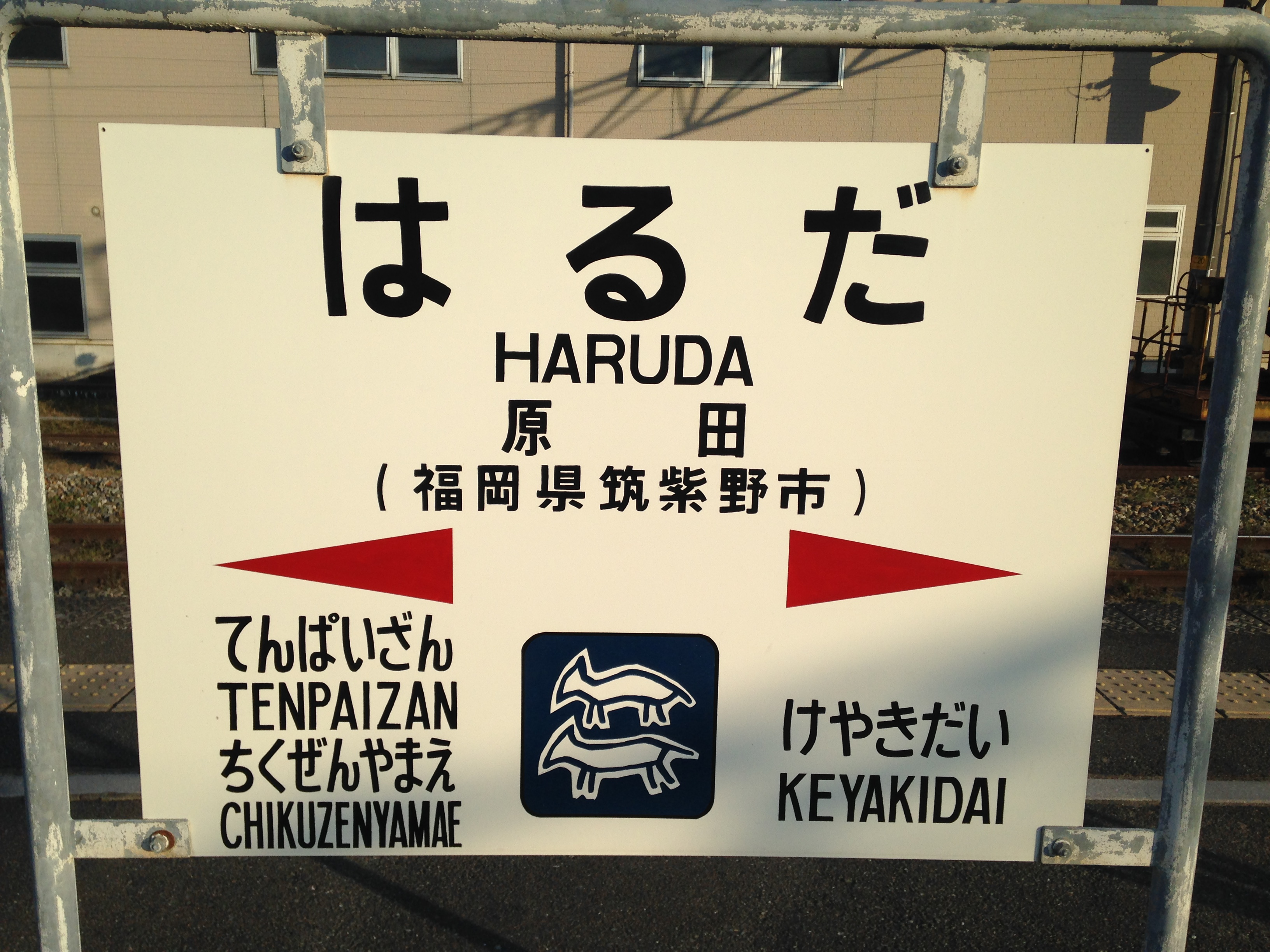 原田駅の駅名標(イラストは五郎山古墳の岩絵)